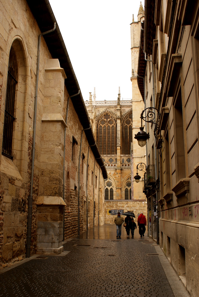 Zonas artísticas y edificios de la capital de León, Comunidad de Castilla y León.